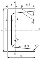 Profil ceownika